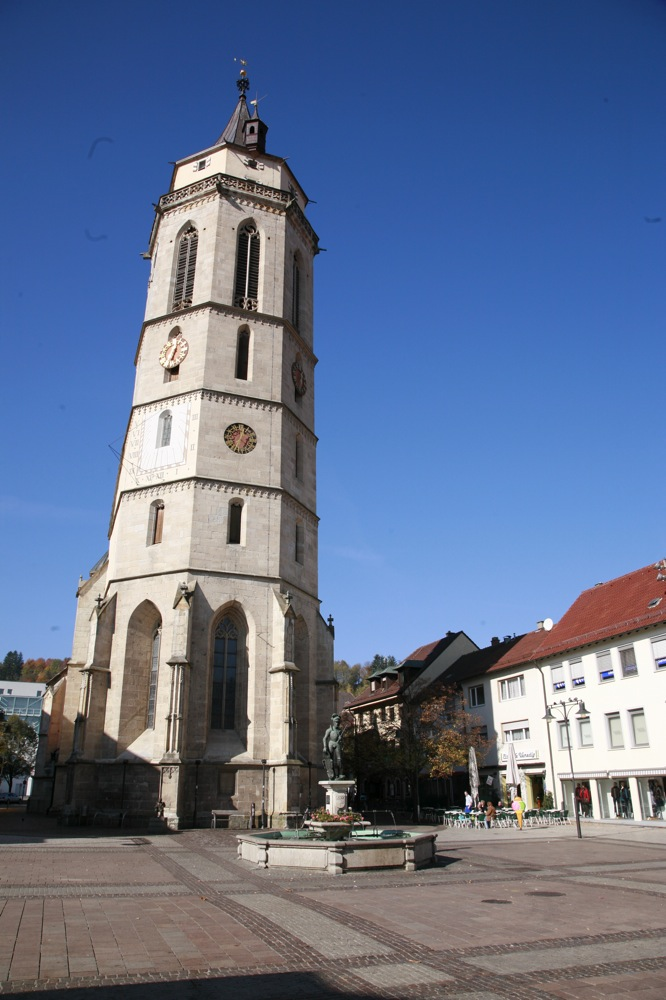 Iglesia parroquial en Balingen (Alemania) - Stadtkirche, Balingen (Germany)